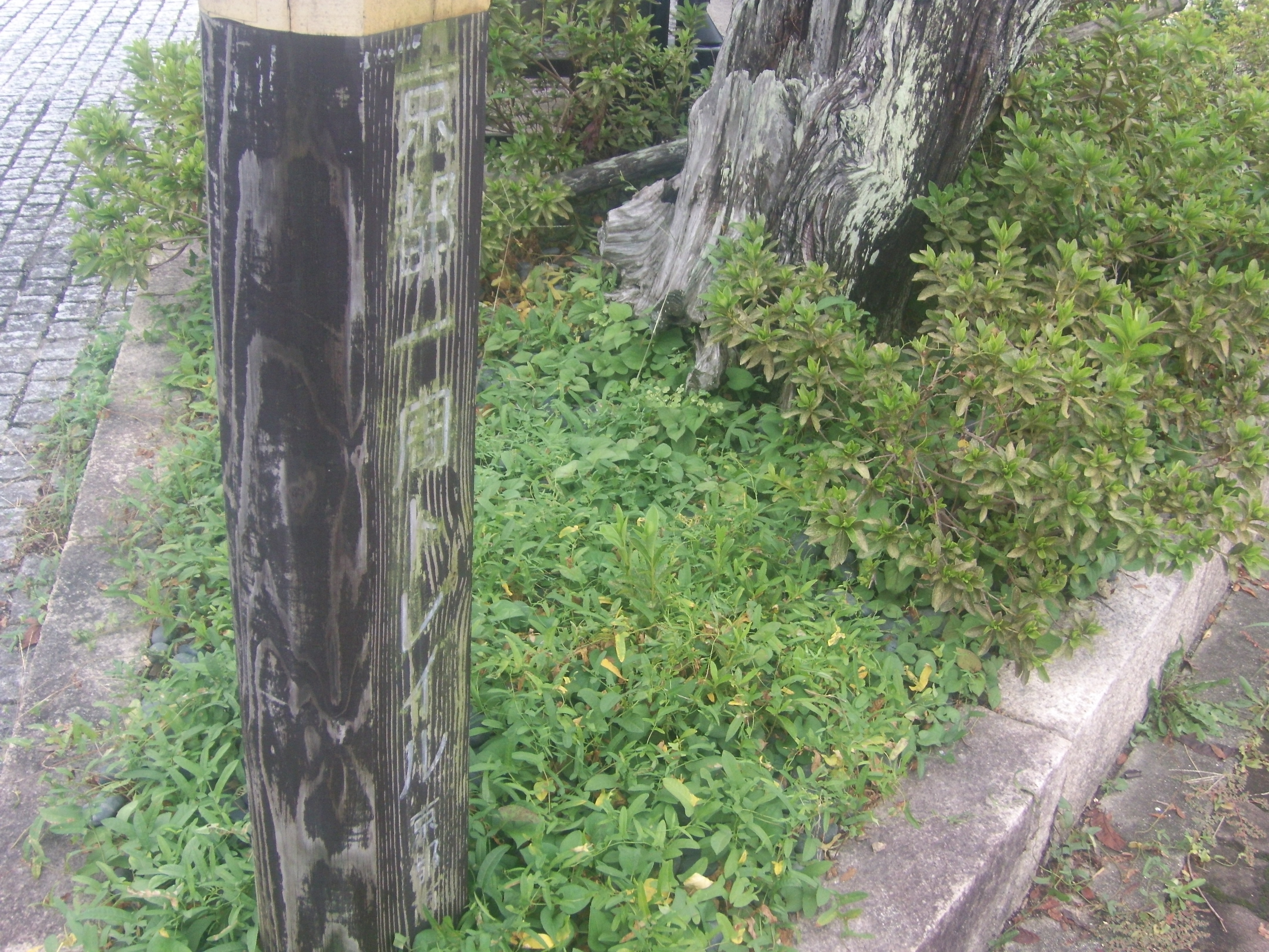 京都一周トレイル道標（右京区京北町）